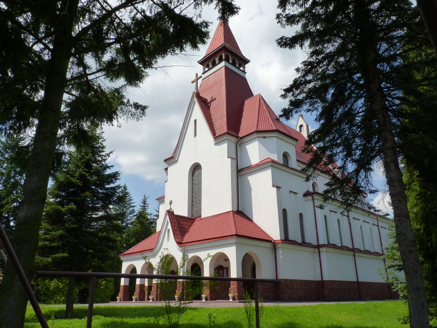 Nowy kościół w Bachórzcu